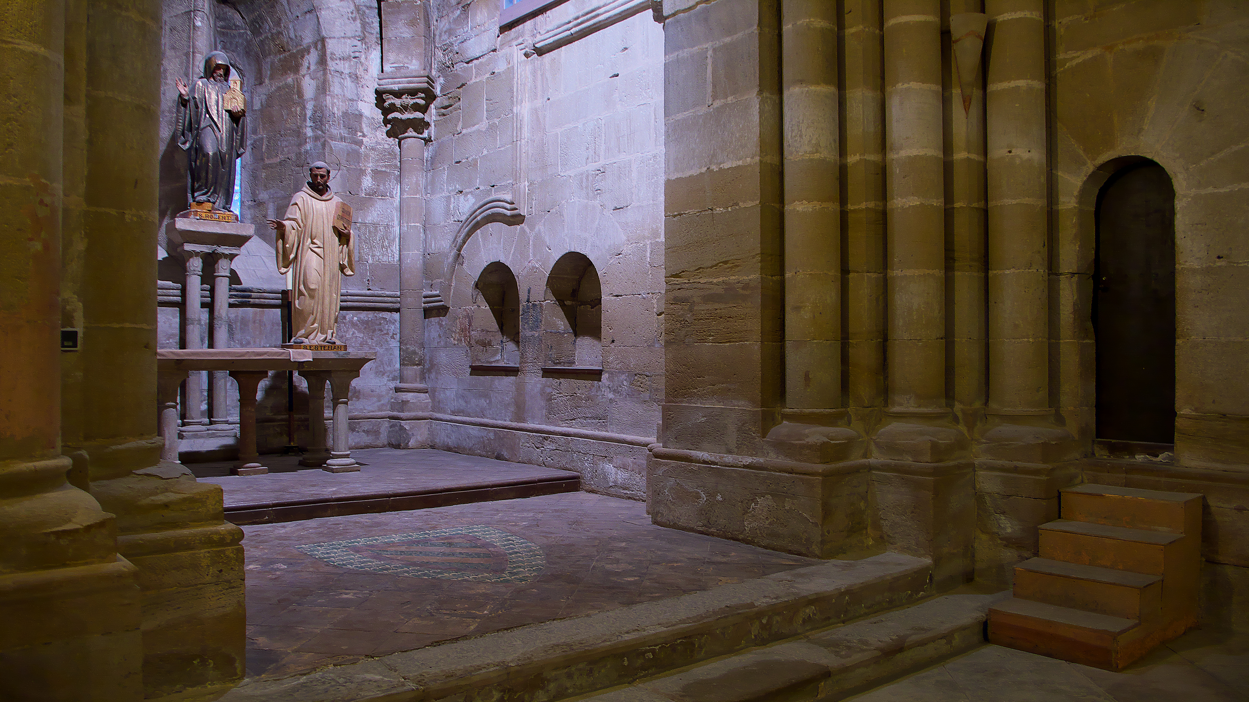 Interior de uno de sus cuatro ábsides de planta cuadrada.